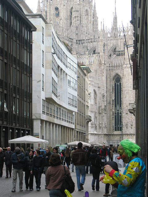 Il Corso Vittorio Emanuele II di Milano con vista sul Duomo.